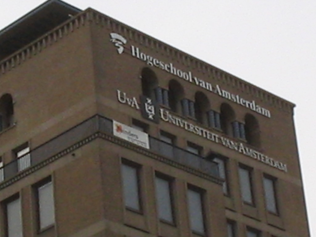 Logo Hogeschool van Amsterdam (Amsterdam, Netherlands), july 2005